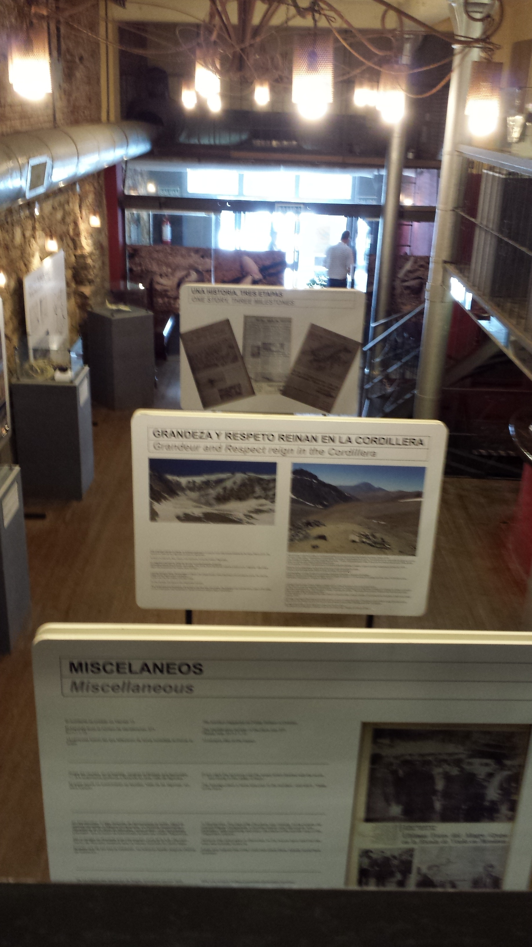 Vista parcial de la planta baja del Museo Andes 1972.